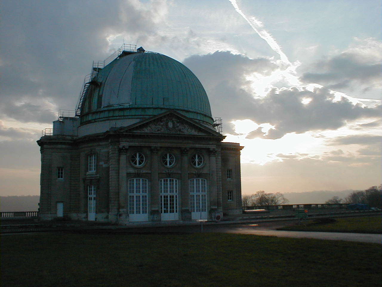 Grande Coupole au dessus du chateau, Observatoire de Paris, section de Meudon